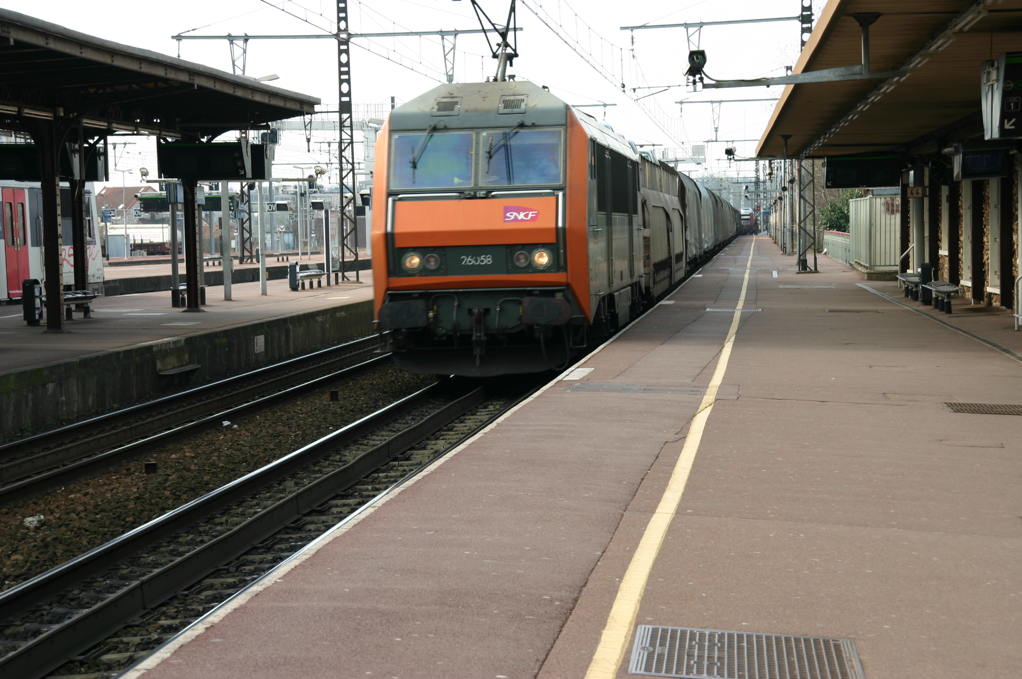 La gare de Melun, Melun, département de la Seine-et-Marne (France)